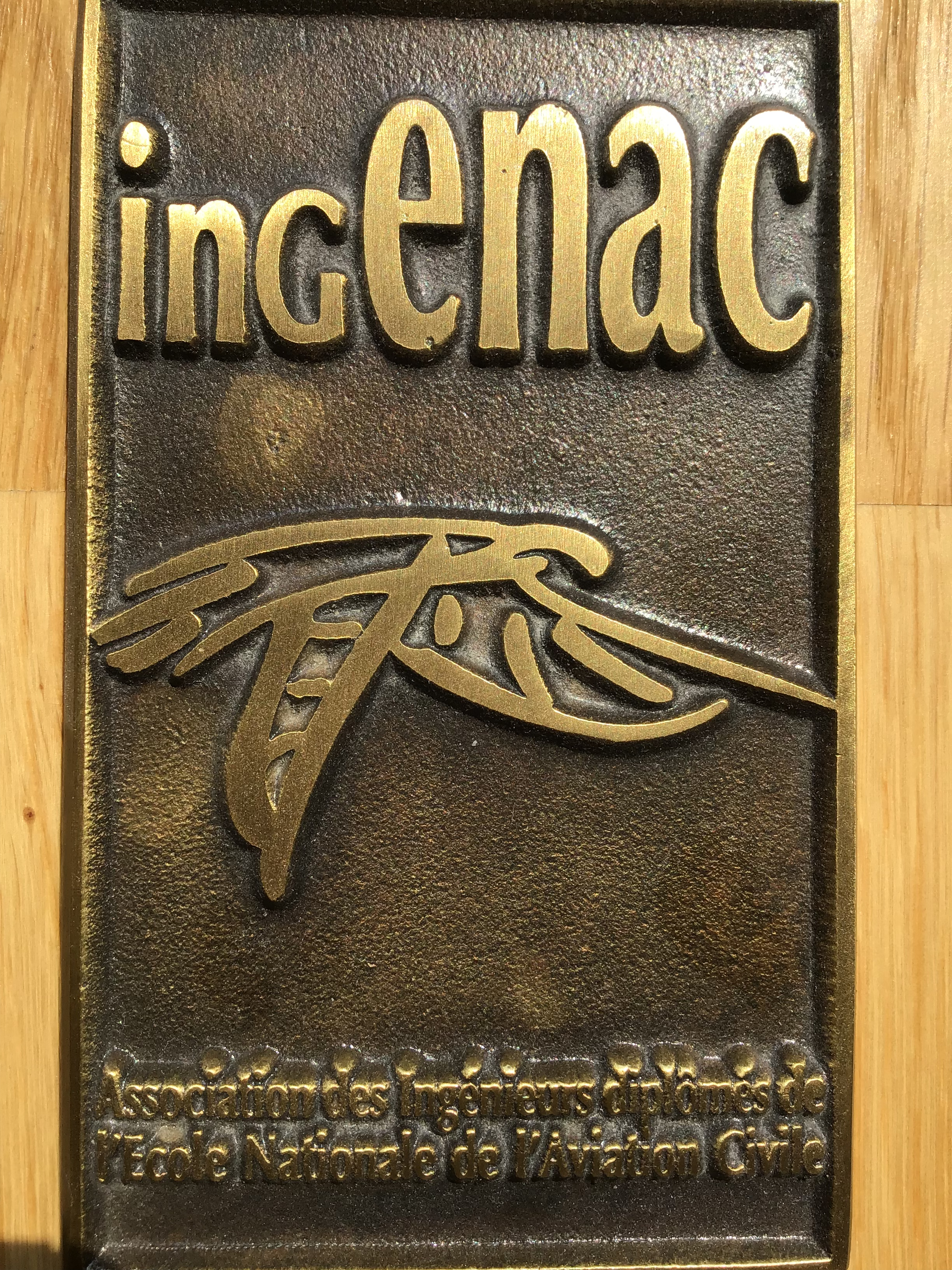 Prix INGENAC, récompensant l’étudiant le plus méritant